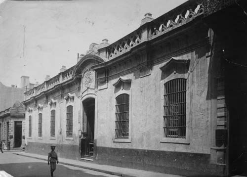 Fachada de la Casa de la Virreina Vieja o de la Virreina Viuda, construida a fines del siglo XVIII para el Virrey Joaquín del Pino y Rozas, donde luego vivió su viuda. Allí se fundó el Monte de Piedad en 1878, que con el paso de los años evolucionaría en el Banco de la Ciudad de Buenos Aires. En 1910 fue demolido para construir el Edificio Otto Wulf.